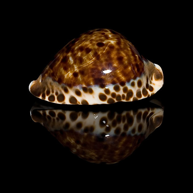 Gehäuse aus der Gattung Zoila der Familie der Kaurischnecken (Cypraeidae)